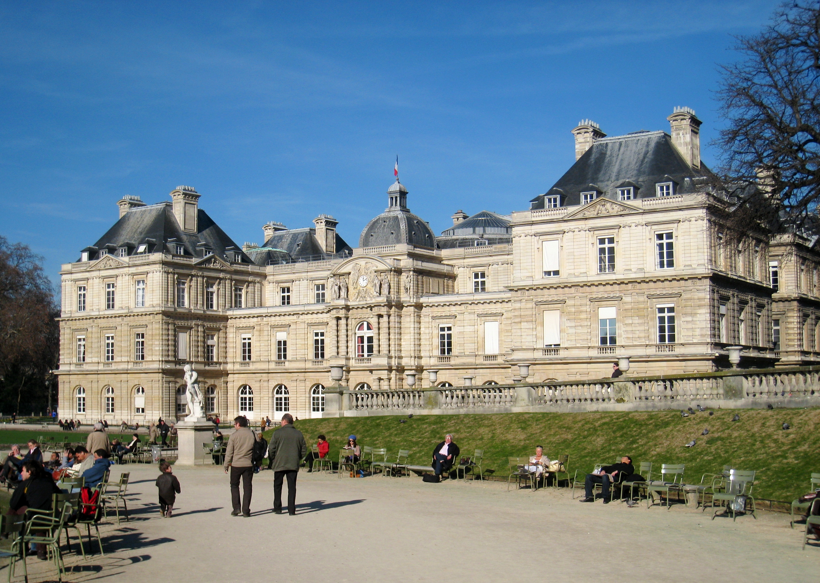 Palais du Luxembourg, Paris, France - oblique view of garden-side facade.